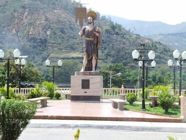 Entrada de poblacion de Carache Trujillo